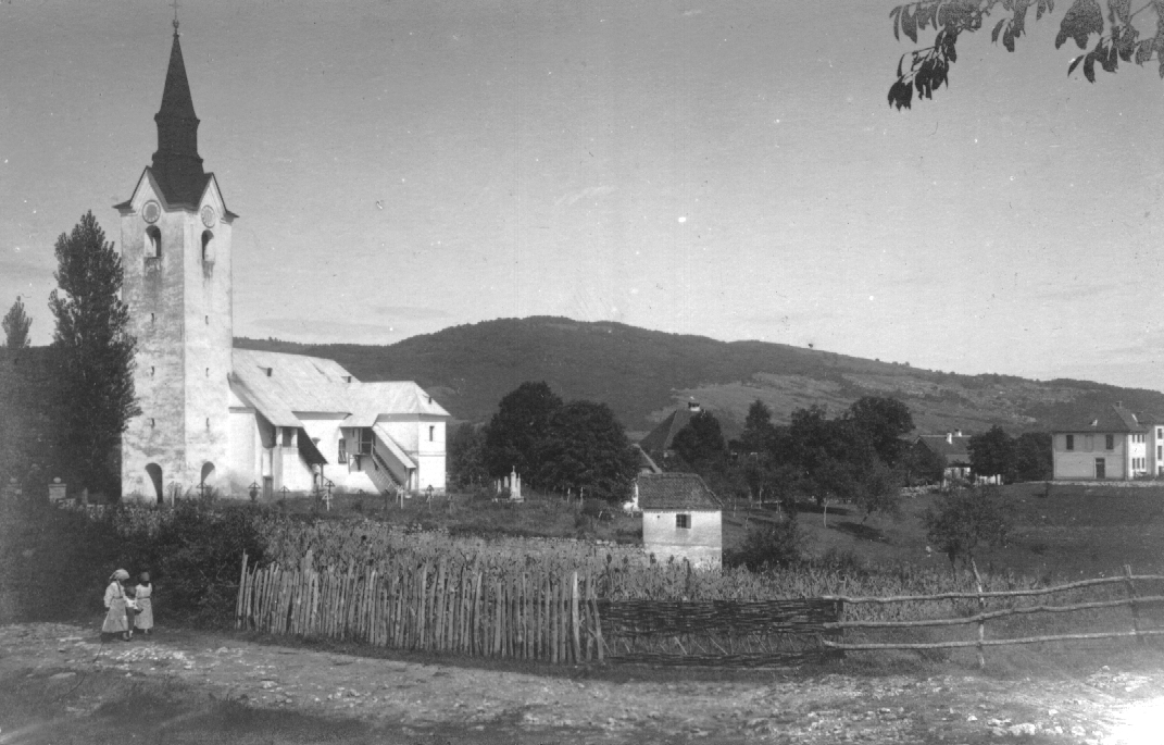 Župnijska cerkev sv. Nikolaja v Adlešičih.